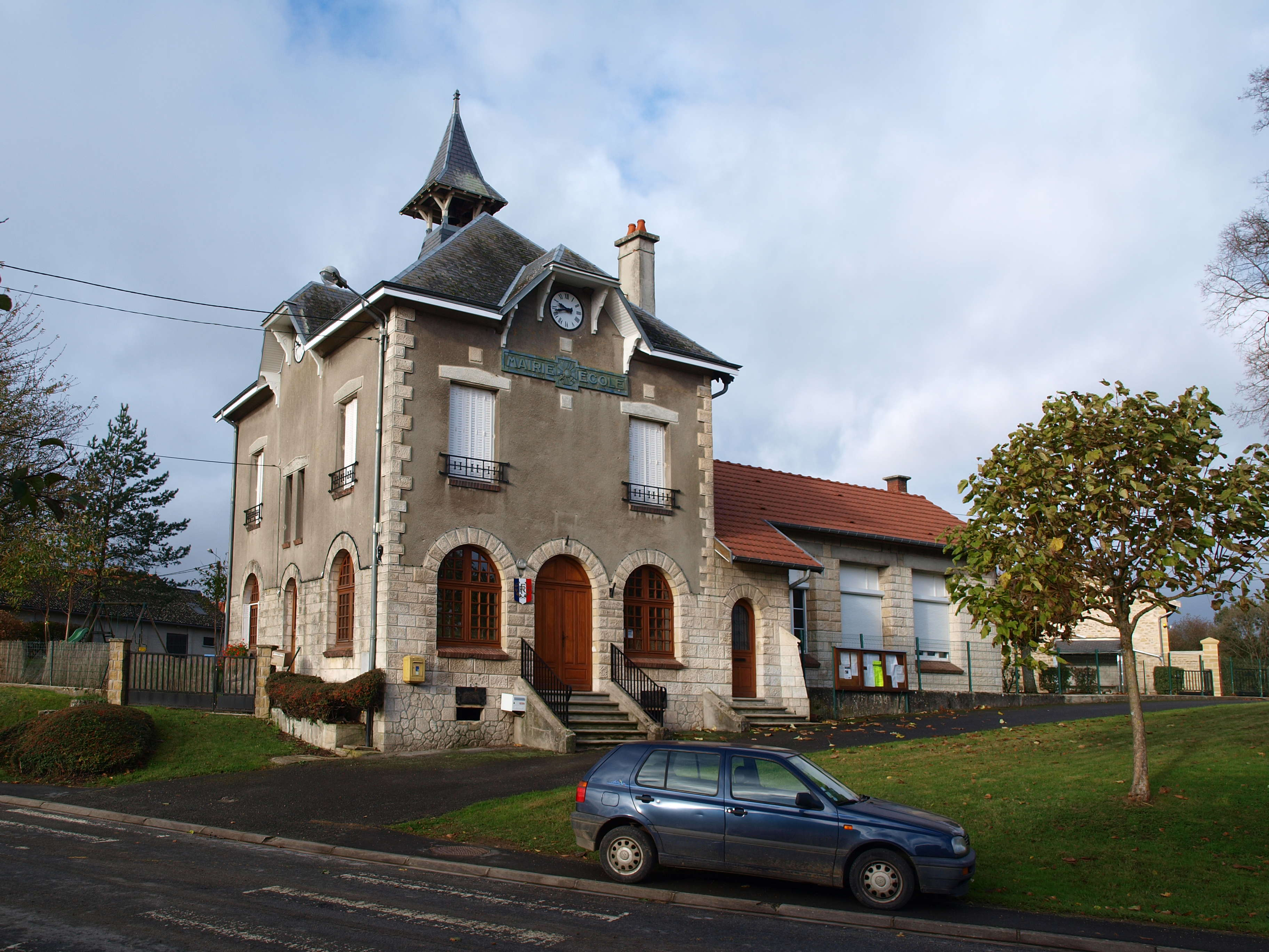 Belleville-et-Châtillon-sur-Bar (Ardennes, France) ; le village de Belleville-sur-Bar ; mairie.